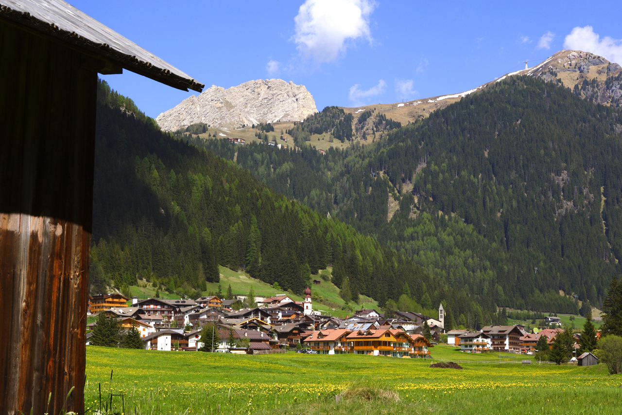 Photo of Canazei.